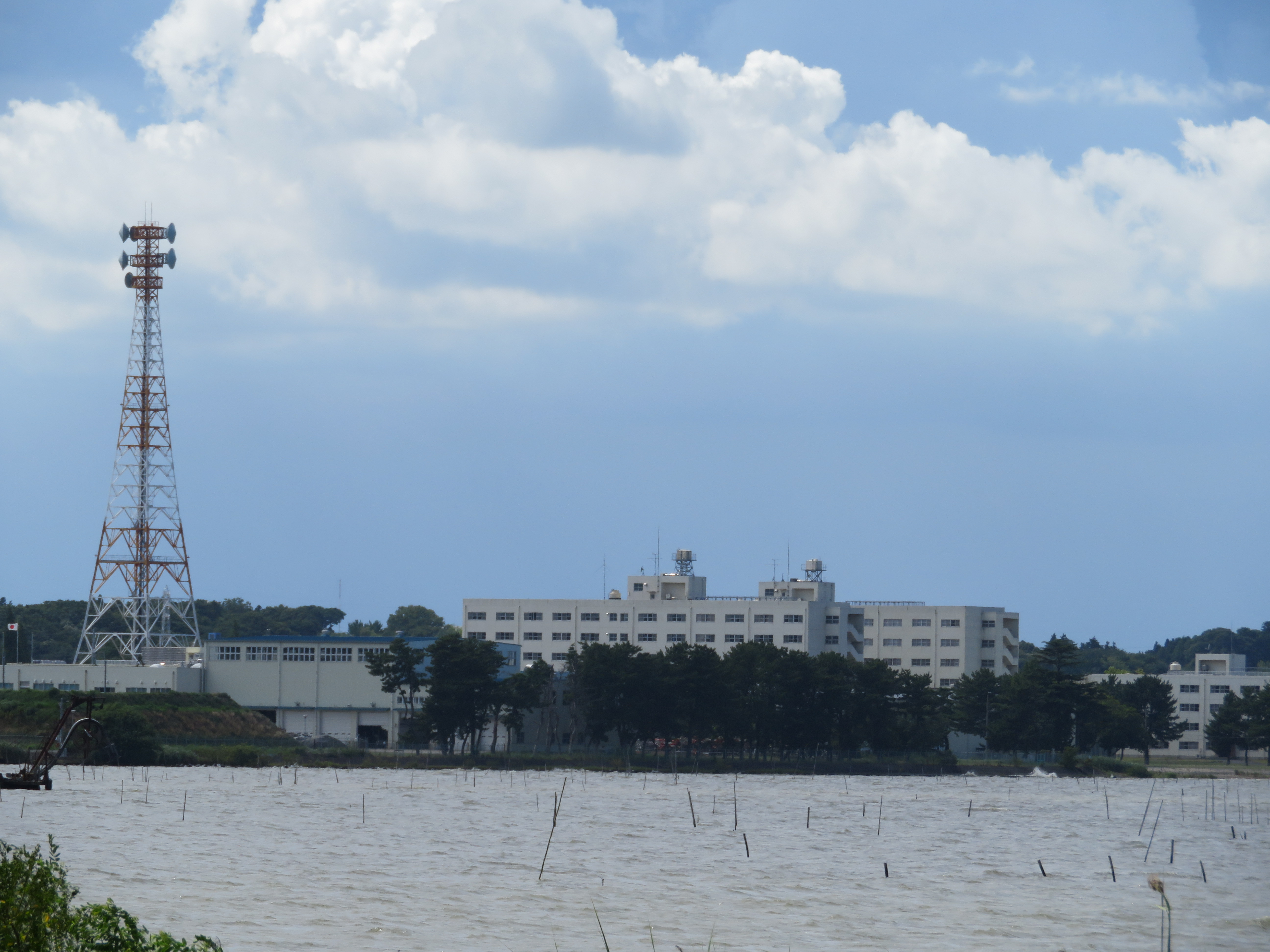 陸上自衛隊土浦駐屯地。阿見町サイクリングロードより撮影